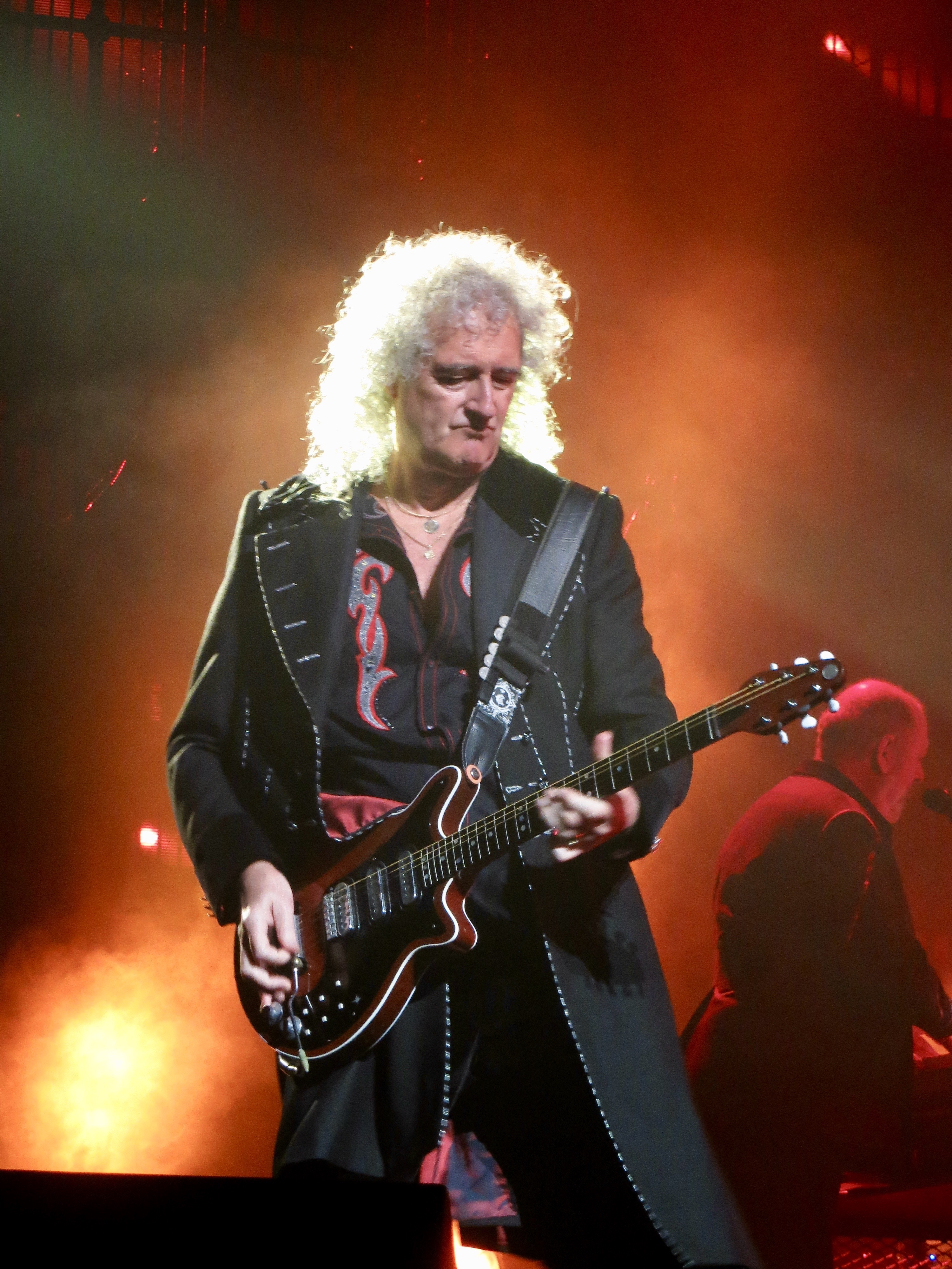 Queen + Adam Lambert 5